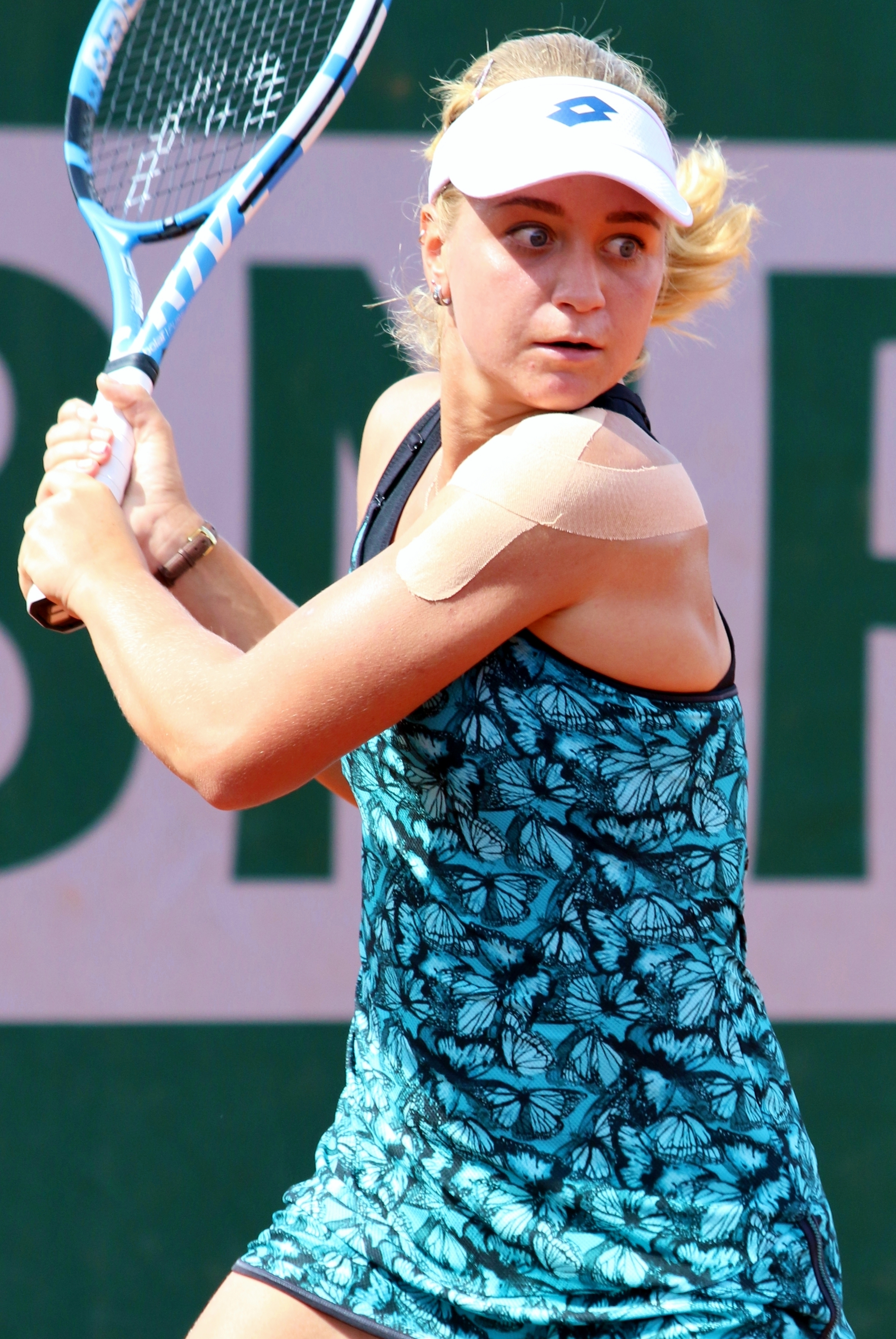 Khromacheva RG18 (14)